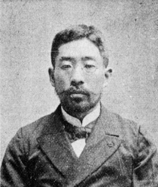 斎藤宇一郎